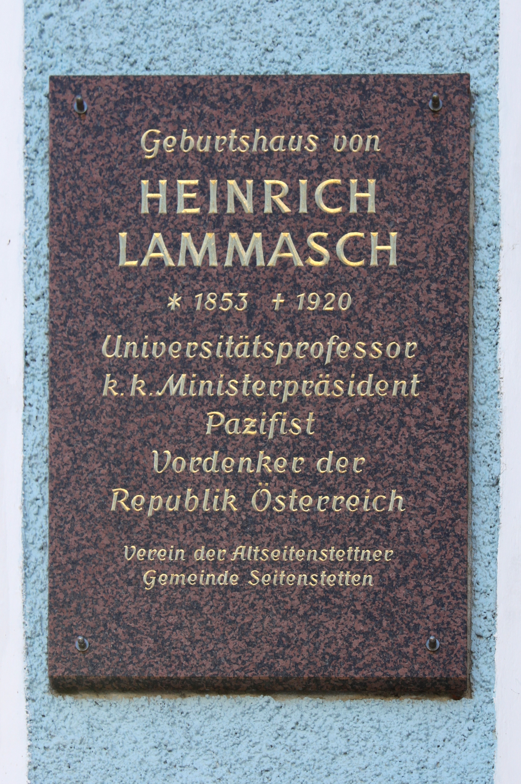 Geburtshaus Heinrich Lammasch, in Seitenstetten, Gedenktafel